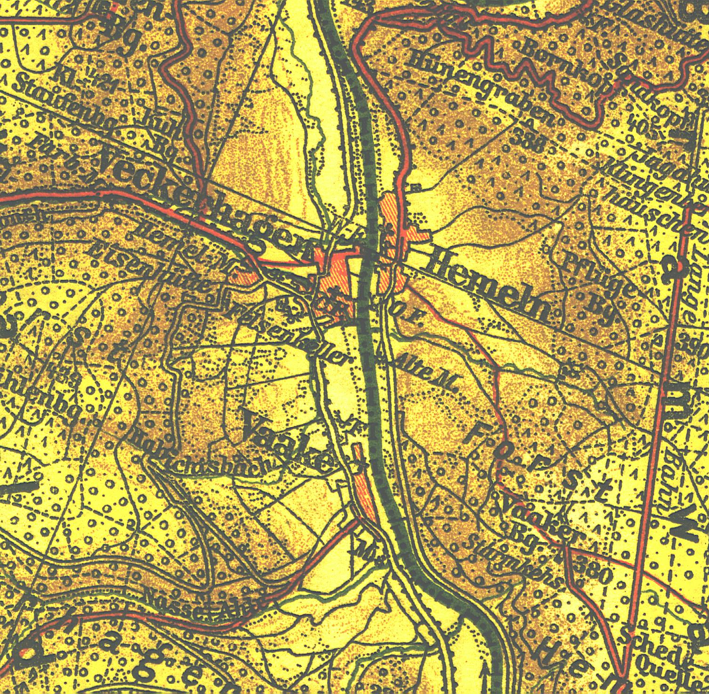 Karte von Vaake, Veckerhagen und Hemeln um 1905 Quelle: F.A.Brockhaus' Geogr.-artist. Anstalt in Leipzig für Verlag des Wesergebirgsvereins, Hameln Fotograf/Zeichner: unbekannt Datum: 1905 Sonstiges: gescannt von presse03 2006